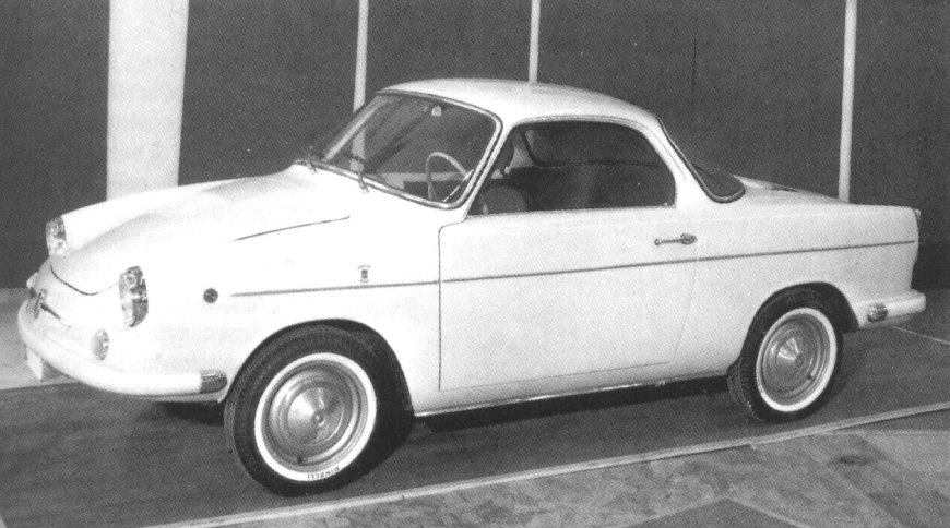 Une fiat modèle